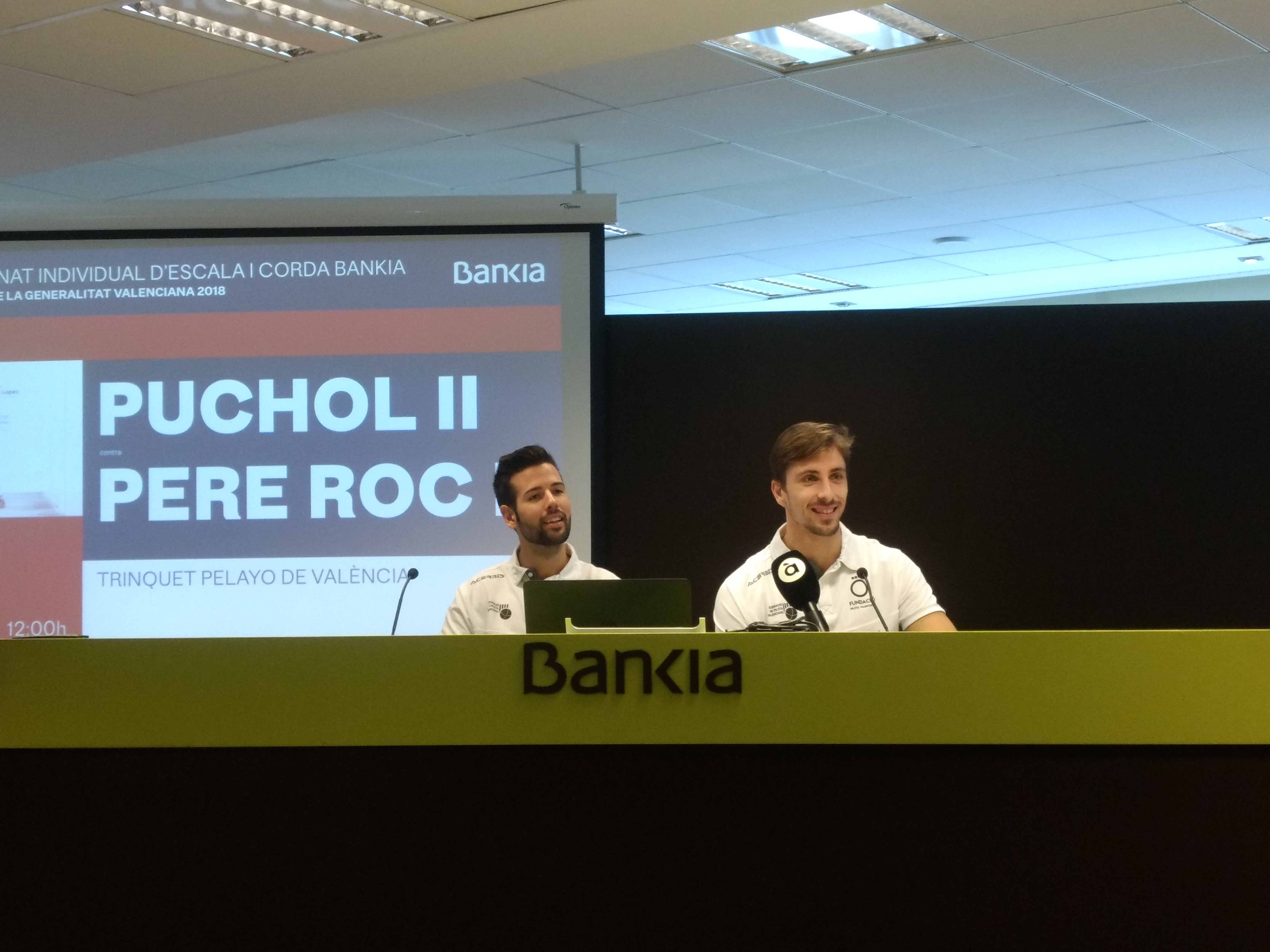 Pere Roc II i Puchol II a la seu de Bankia, en la presentació de la final de l'individual d'Escala i Corda.